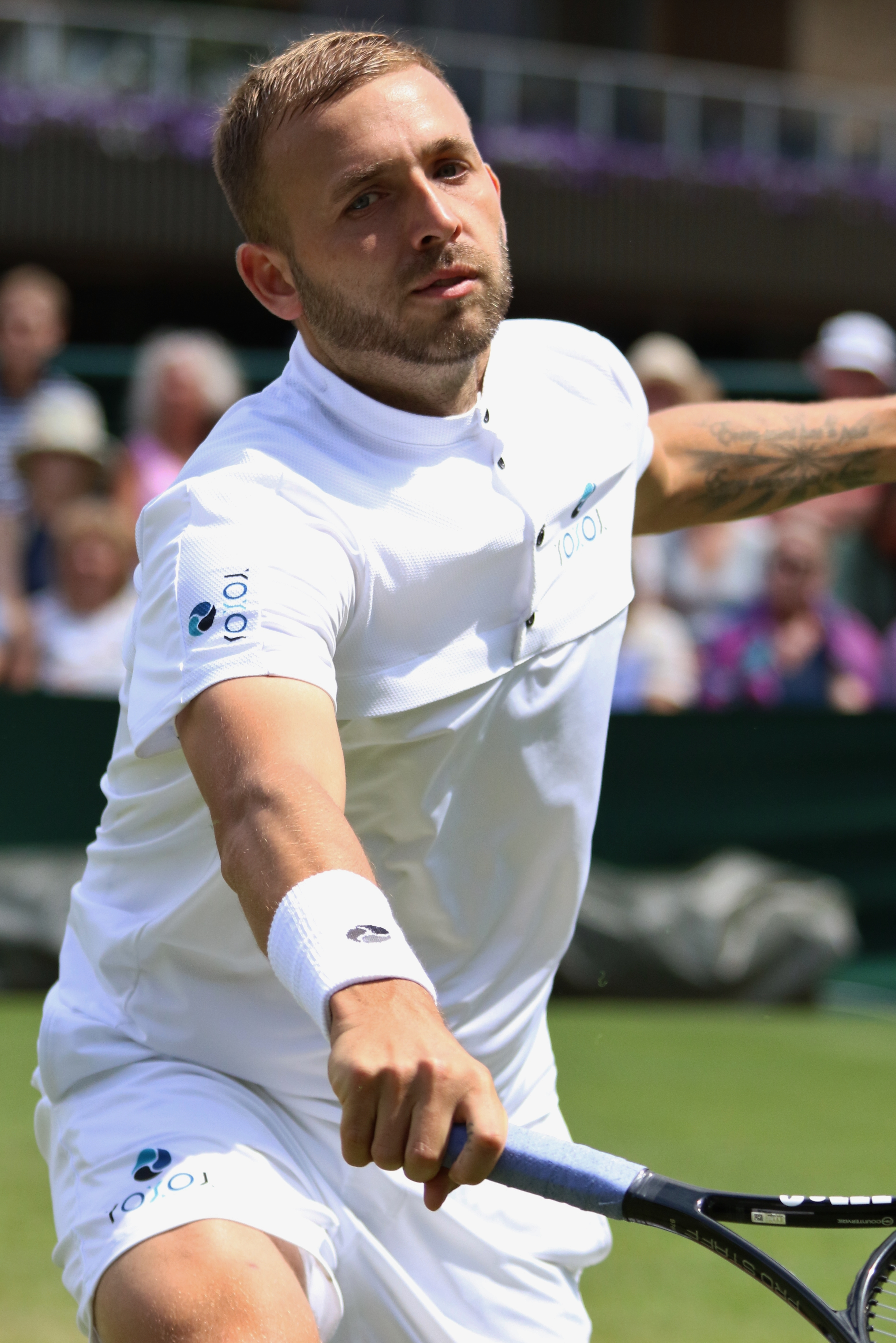 Evans WM19 (24)